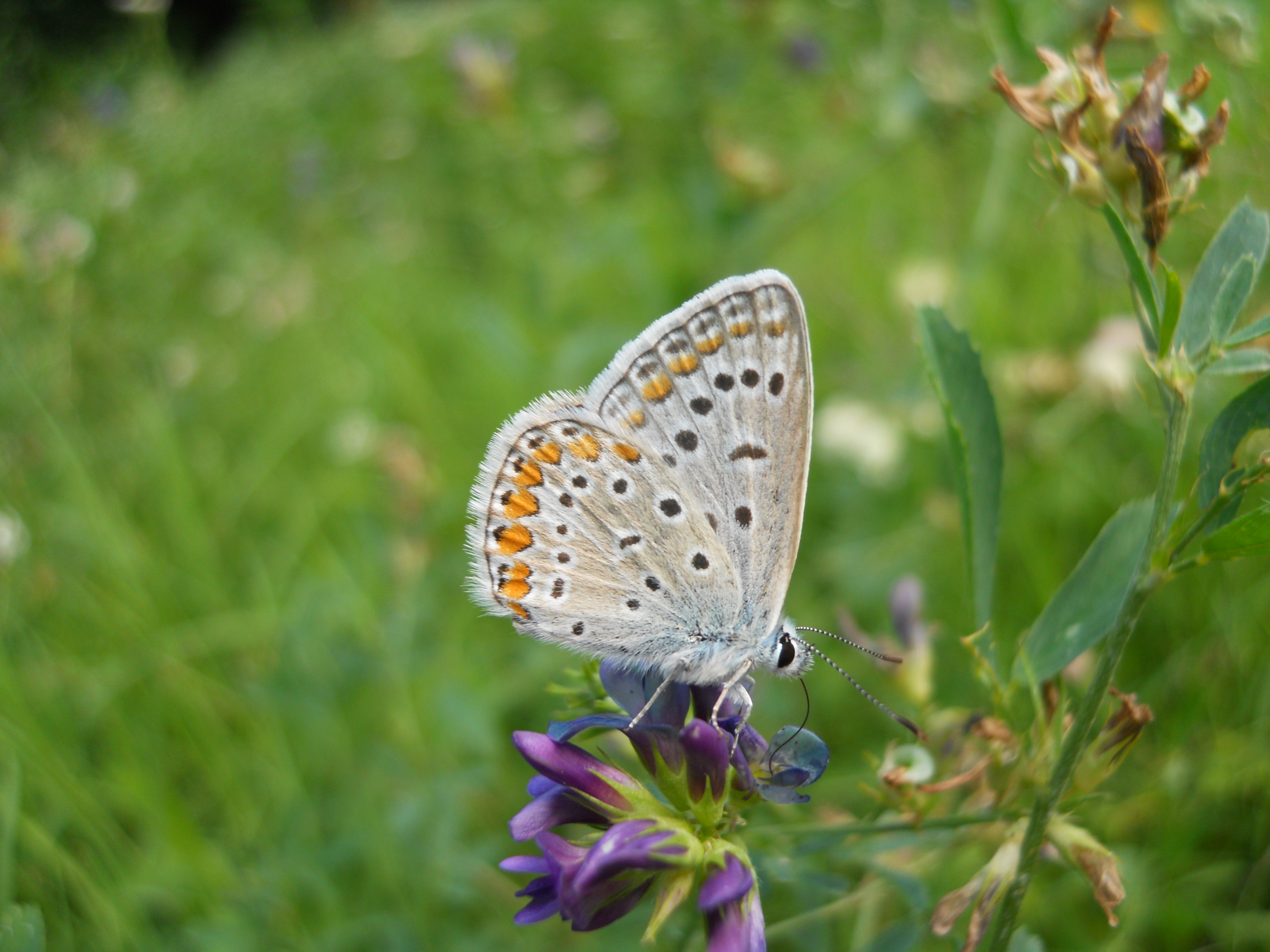 Un maschio di farfalla della specie Polyommatus icarus